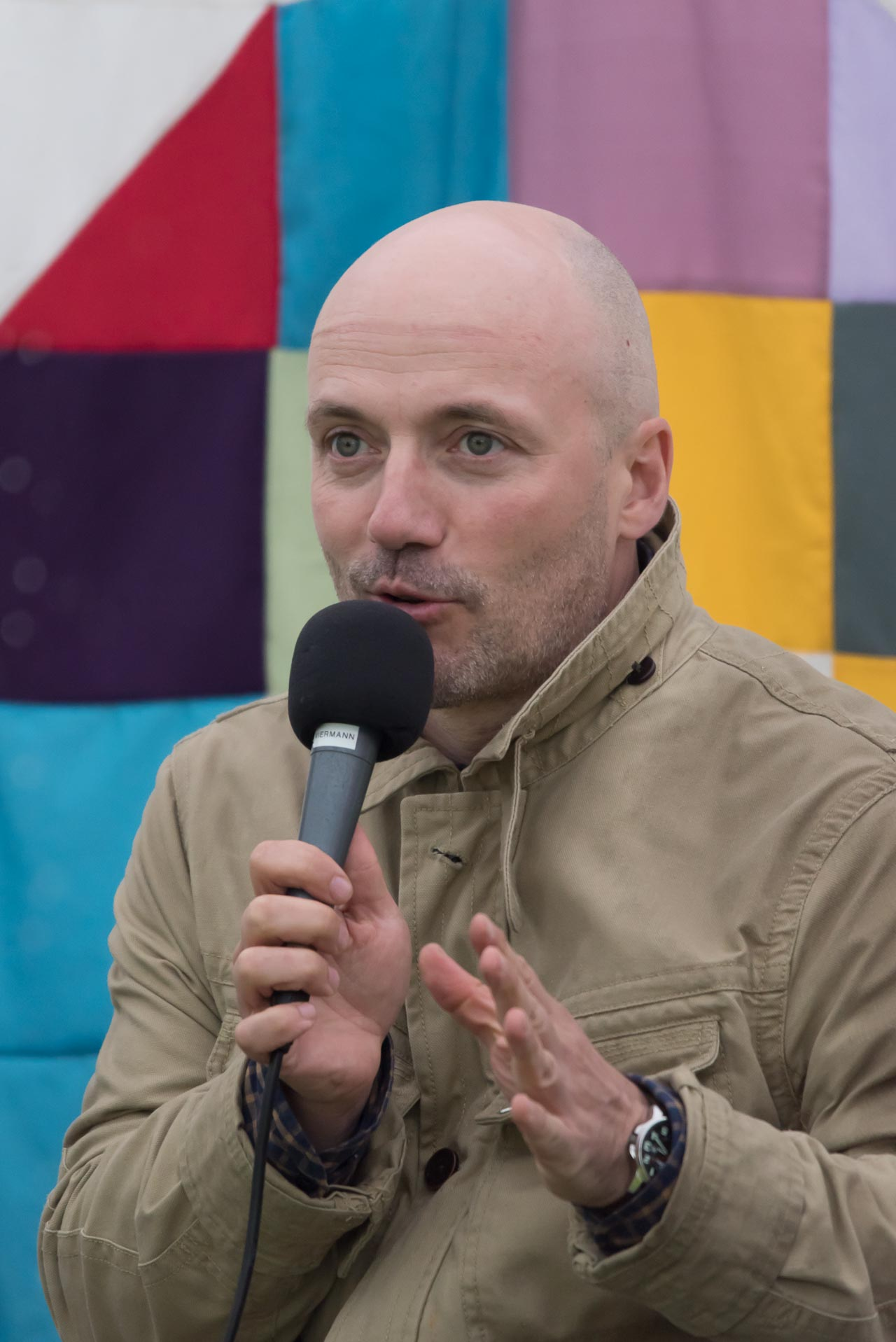 Ilmar Raag teisel Arvamusfestivalil Narvas. Arutelu teemaks "Ida­-Viru meediapeeglis – ilus või kole?".